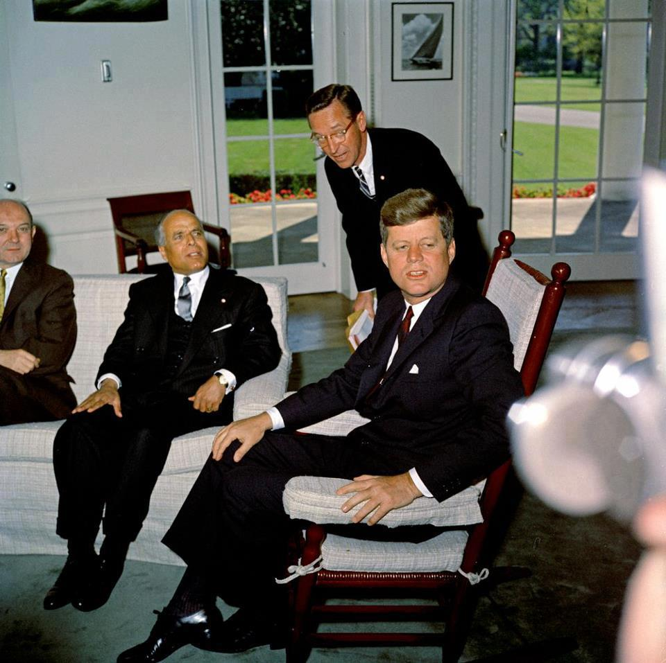 Habib Bourguiba and JF Kennedy - May 1961 in The White House